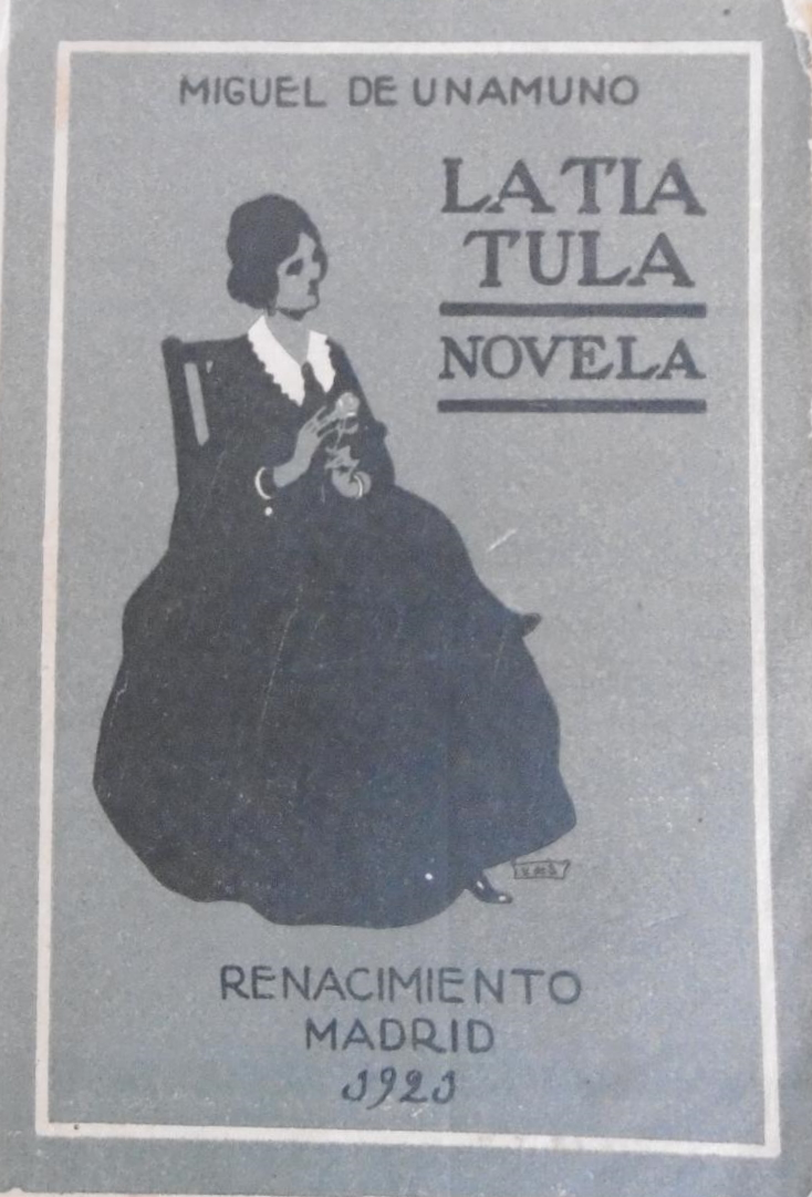 Portada de la primera edición de la obra La tía Tula de Miguel de Unamuno de 1921